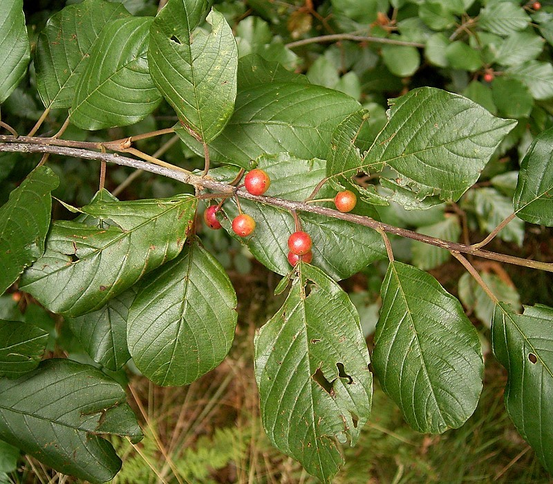 Rhamnus frangula